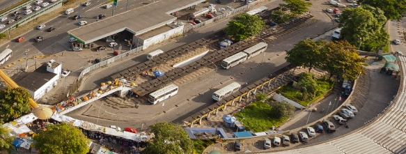 Vista aérea da região da Estação Rodoviária Date 2012-08-21